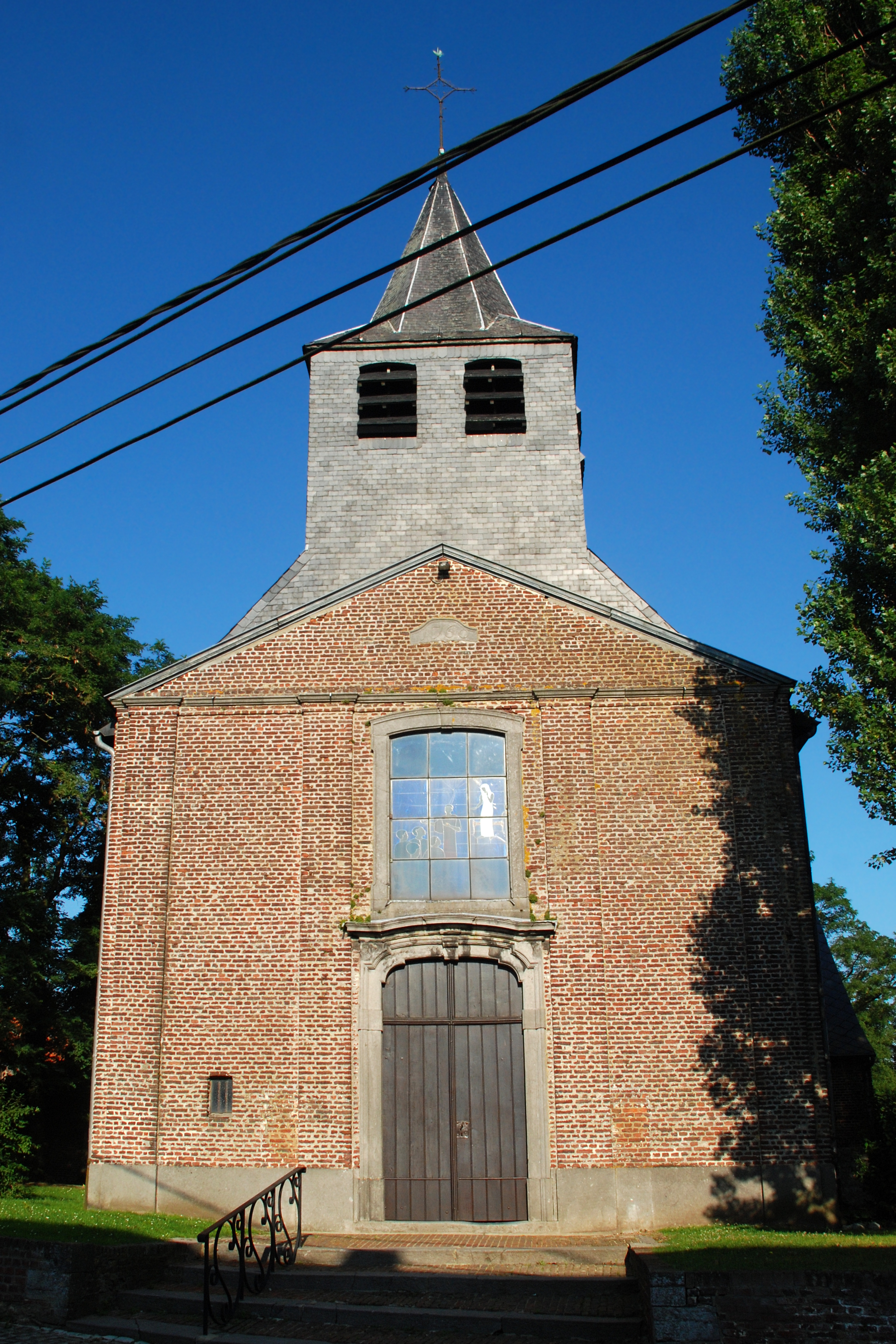 Belgique - Brabant wallon - Église Saint-Pierre de Glabais